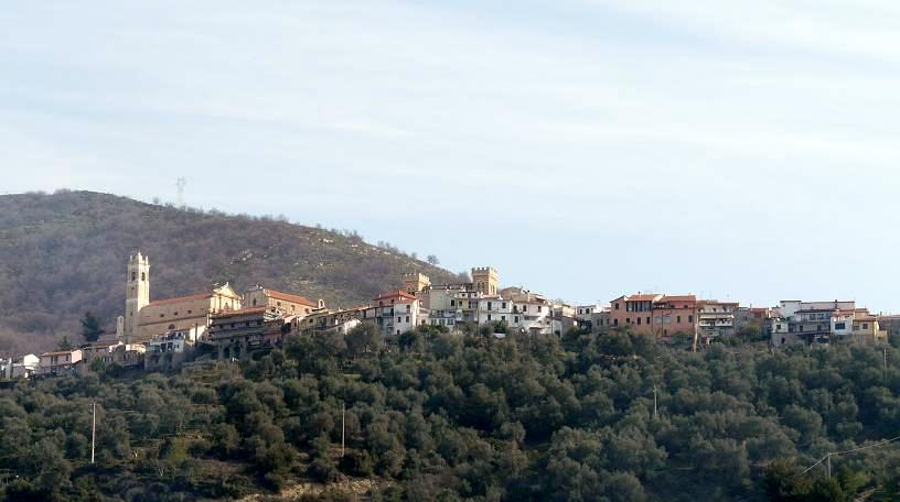 Castellaro, Liguria, Italia